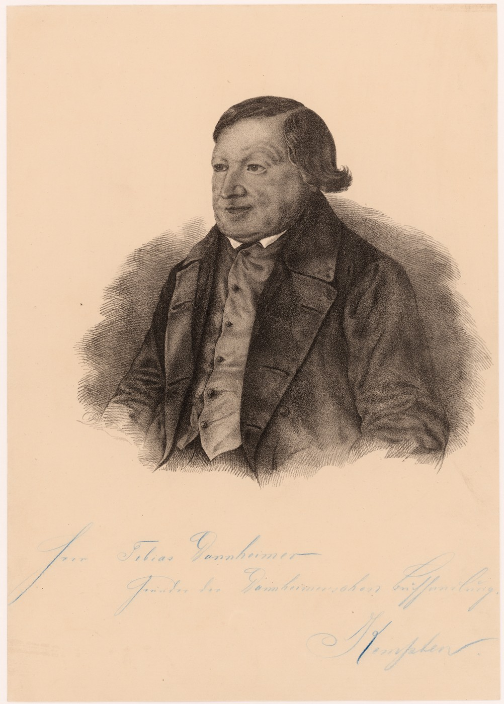 Porträt von Tobias Dannheimer (1769–1861), unten handschriftliche Widmung: "für Tobias Dannheimer | Gründer der Dannheimerschen Buchhandlung. | Kempten" auf Karton (700 x 520 mm)